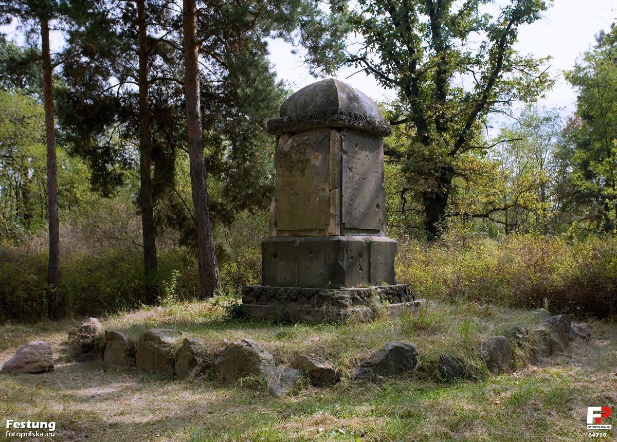 Zbliżenie na Kriegerdenkmal w Zasiekach. Wokół pomnika kamienie z wyrytymi nazwiskami przedwojennych kamieniarzy, prawdopodobnie partycypujących w budowie tego obiektu.